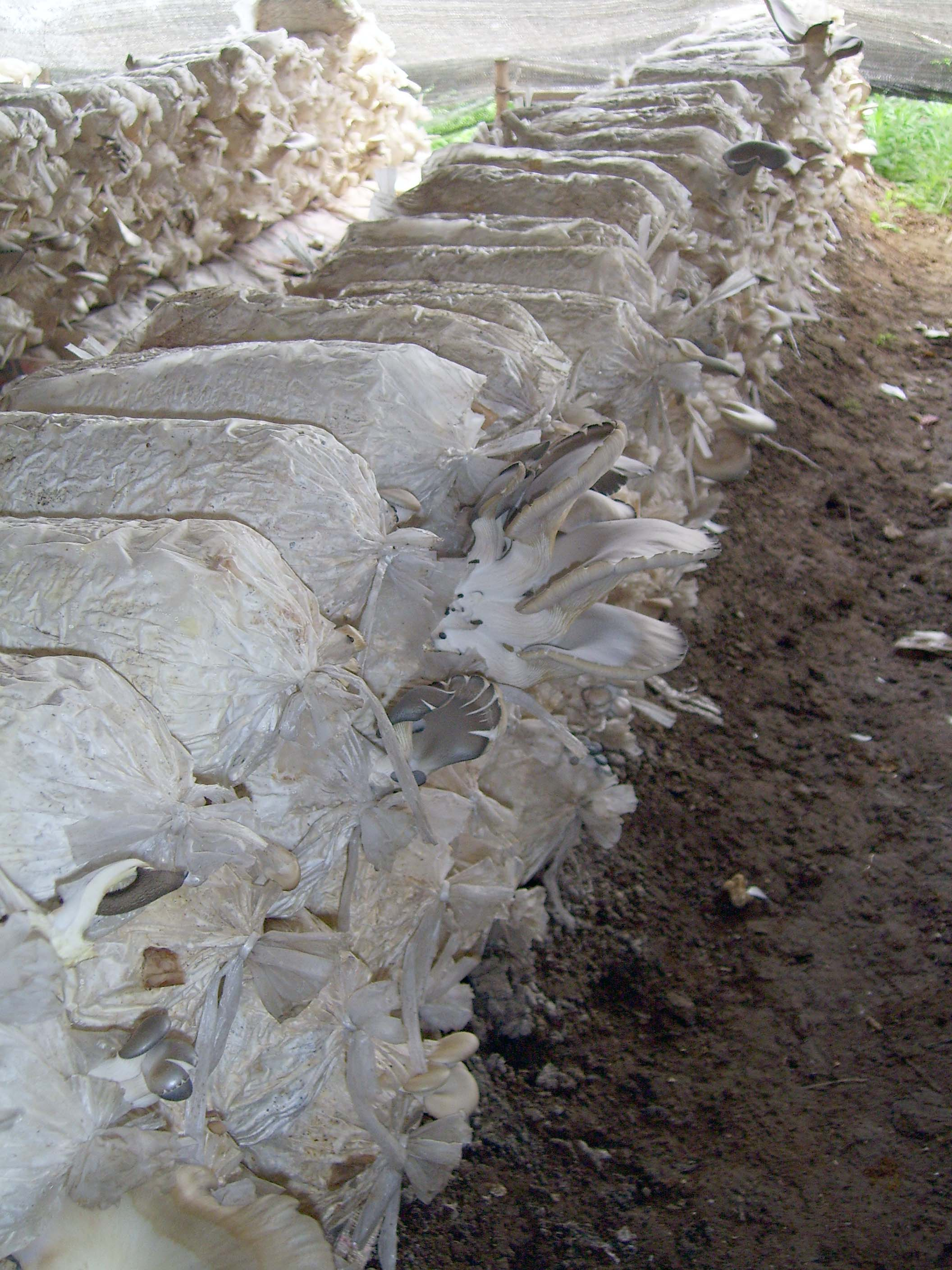 平菇的栽培